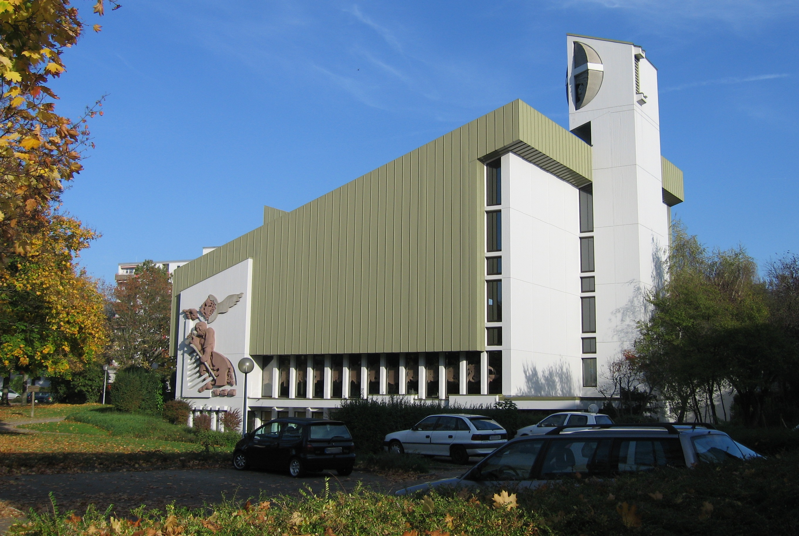 Blick auf die St.Jakobuskirche in Denzlingen.